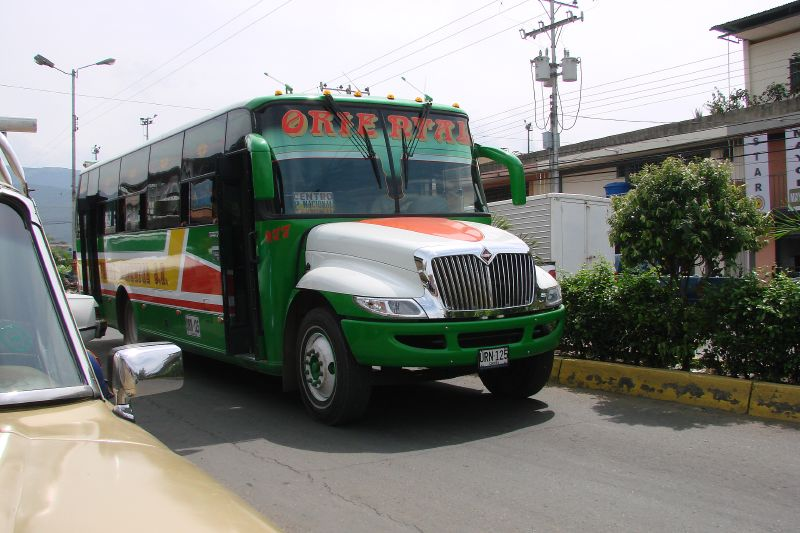 Transporte popular fronterizo entre la ciudad de Ureña (Venezuela) y Cúcuta (Colombia)